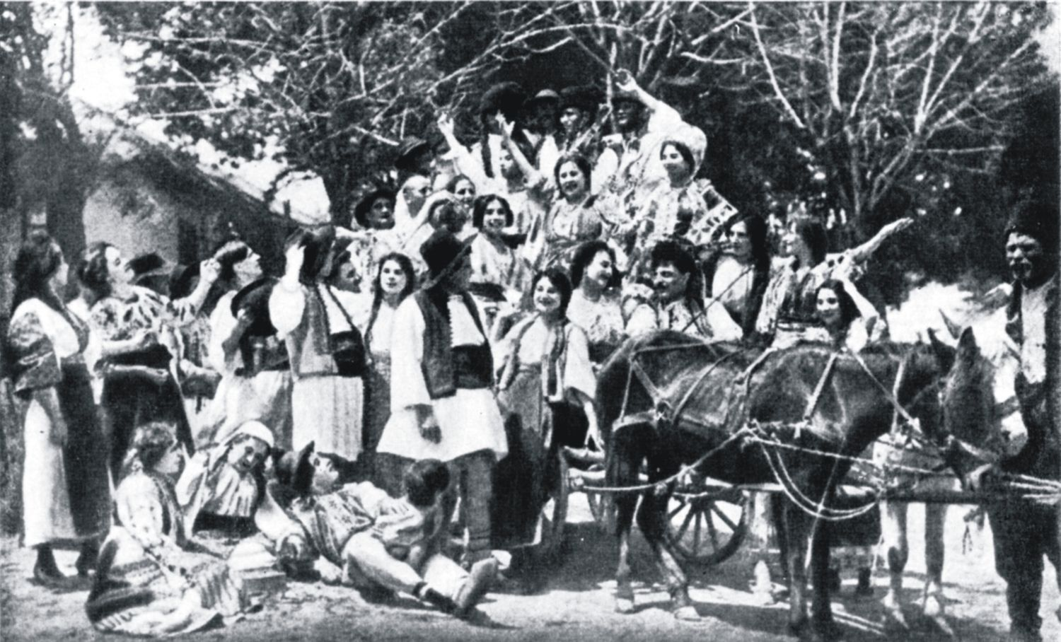 Frame from Independenţa României film (1912). The village. Main actors: Elvira Popescu, Maria Filotti, Maria Giurgea, Jeny Metaxa-Doro, Nicolae Soreanu, Vasile Toneanu, Ion Manu, G. Ciprian, Aurel Athanasescu.